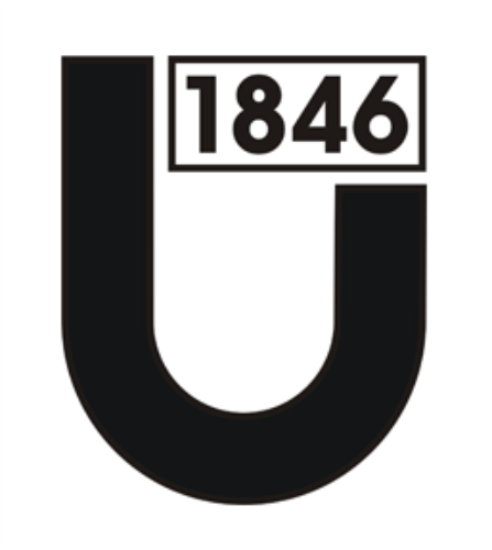 Logo SSV Ulm 1846